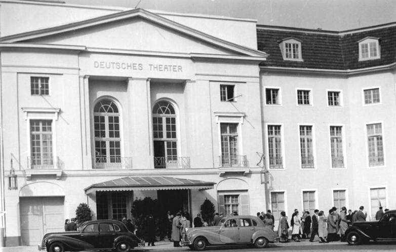 Zentralbild Kemlein 4.10.53 Das Deutsche Theater feierte sein 70jähriges Bestehen. die Intendans und die Schuspieler des Deutsche Theates feierten am 4.10.53 in einer festlichen Matines das 70jähriges Bestehen des Deutschen Theaters, das von Adolf L'Arronge am 29.9.83 gegründet wurde. UBz: Deutsches Theater.